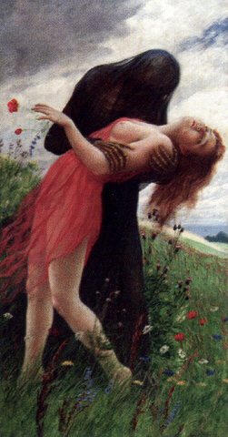 Der Tod und das Mädchen, Öl auf Leinwand, 149 x 78 cm, verkauf tbei Van Ham Kunstauktionen, 2000